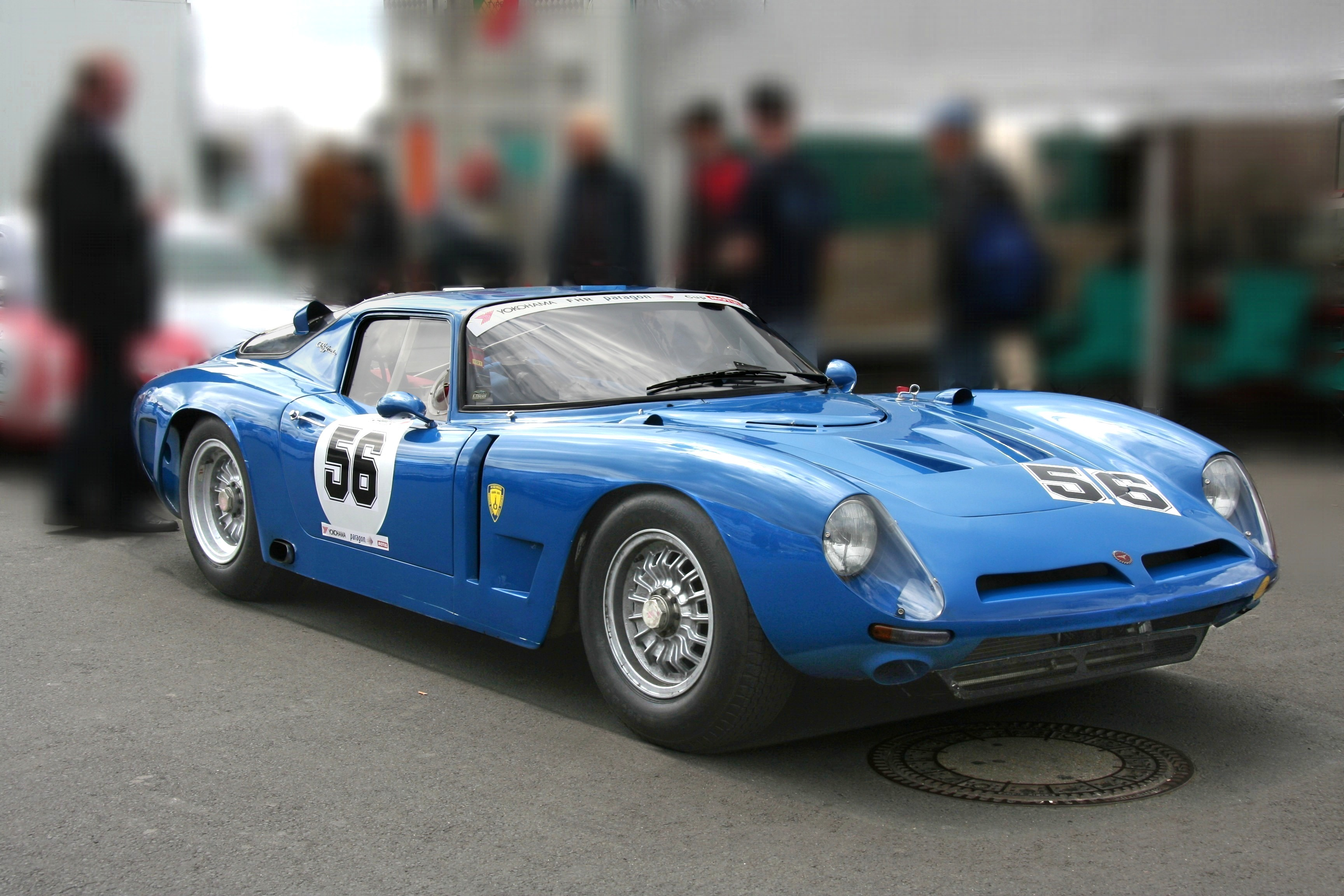 Bizzarrini GT 5300 beim Oldtimer-Festival auf dem Nürburgring, Südschleife